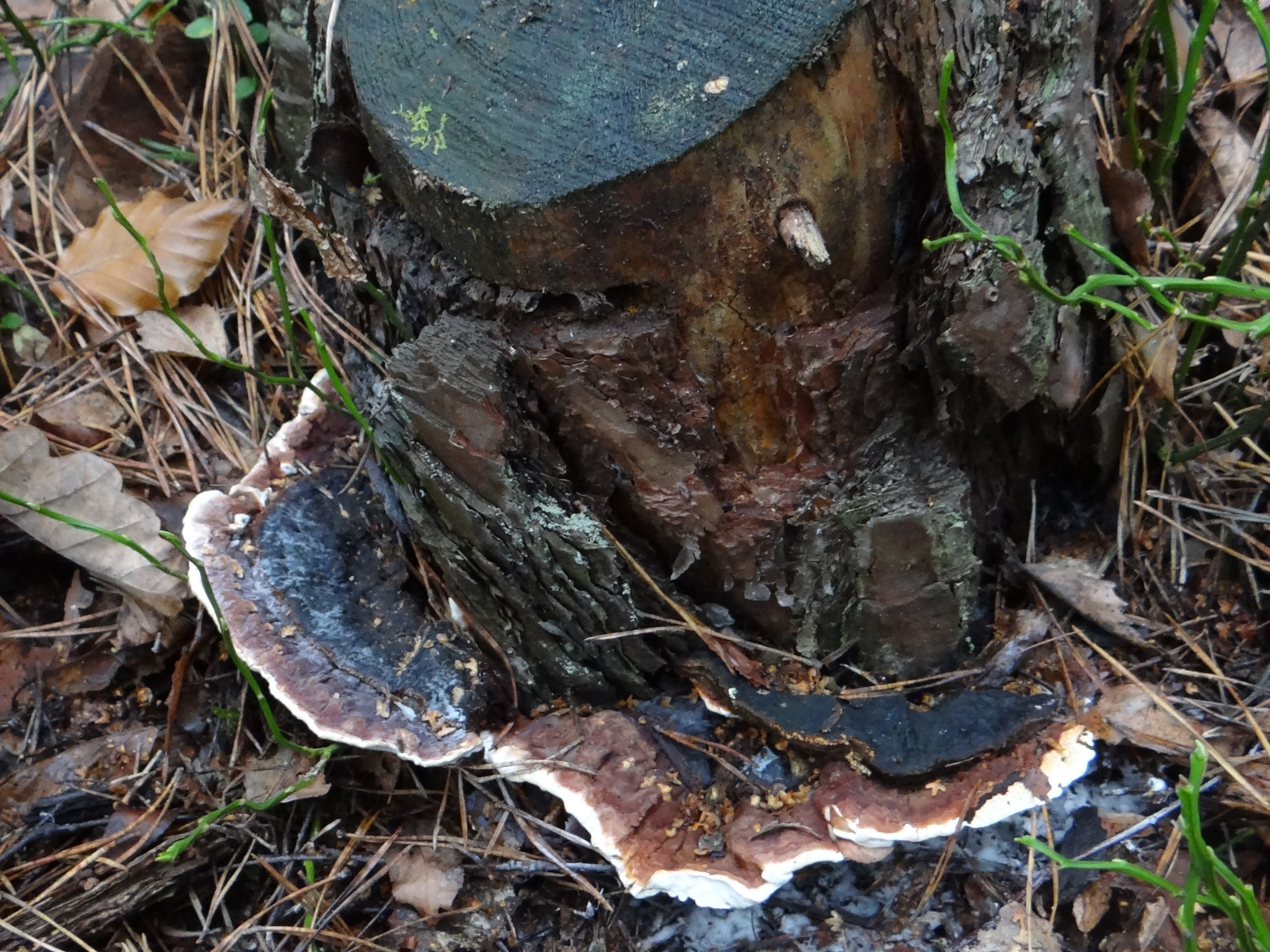 Heterobasidion annosum